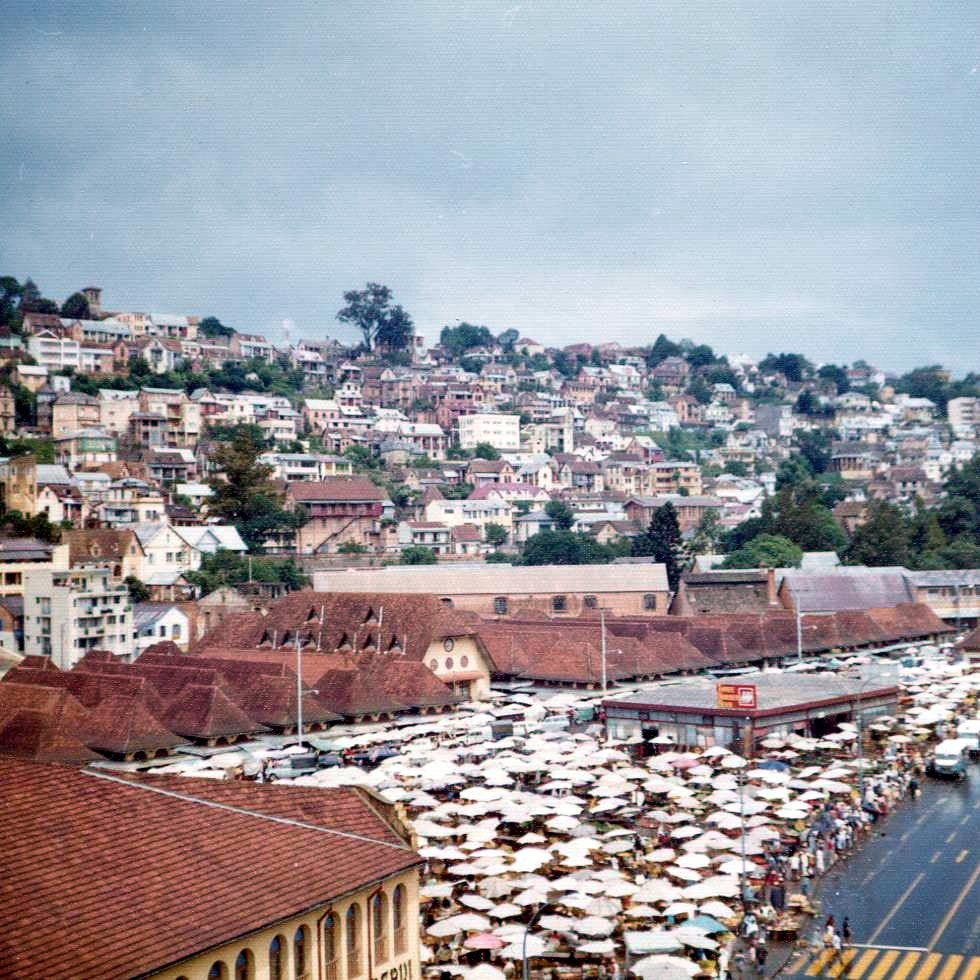 Zoma Tananarive